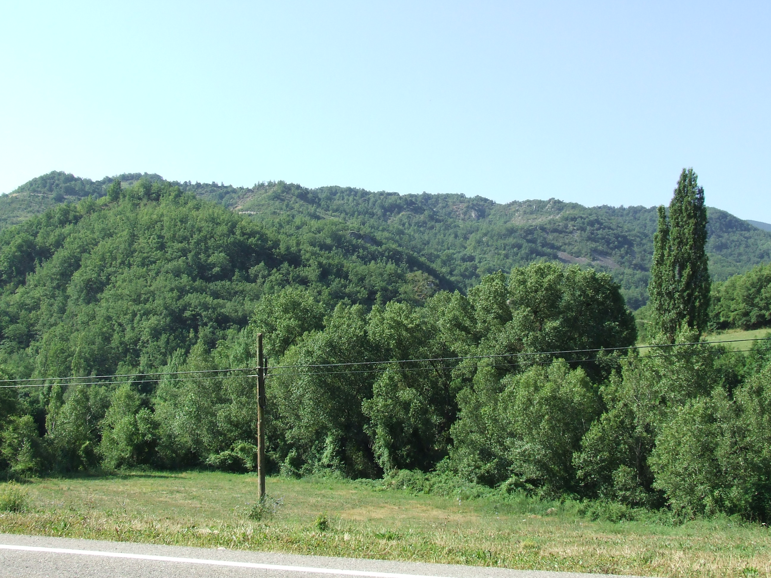 Territori que ocupava la Quadra de Miravet, part de l'antic ajuntament de Cadolla (Senterada, Pallars Jussà)